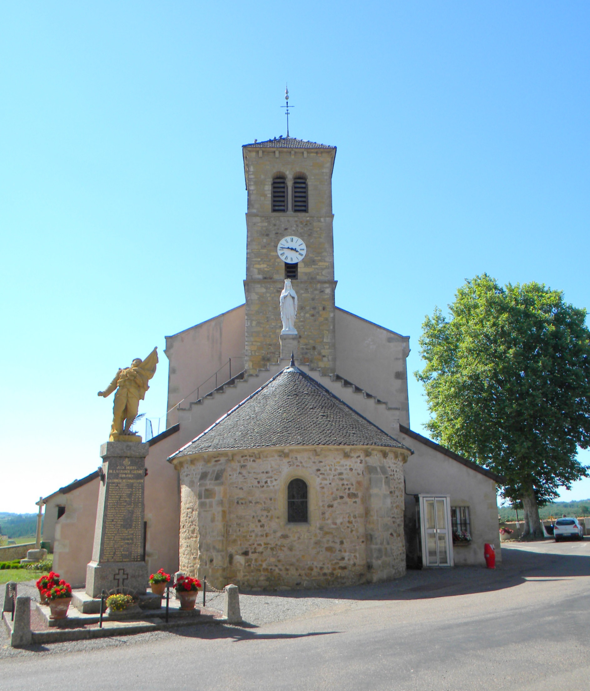 Eglise Saint-Saturnin de Vauban (Saône-et-Loire)